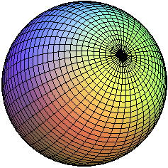 Figura realizada por M.Romero Schmidkte ✉ con el programa Mapple, especialmente para la Enciclopedia Libre y la Wikipedia.